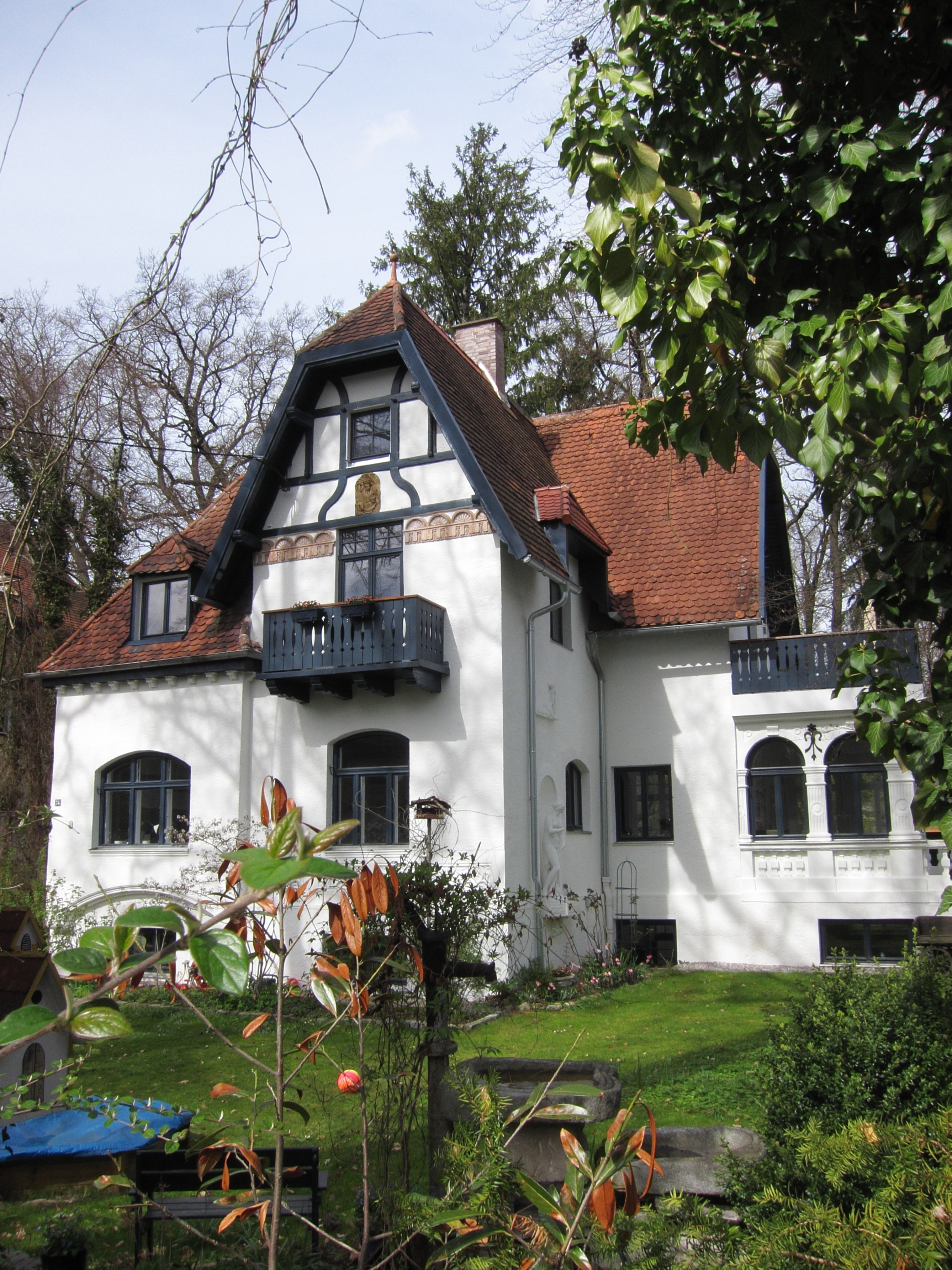 Lichtingerstraße 24; Kleinvilla, historisierend, 1902 von Jakob Mack.